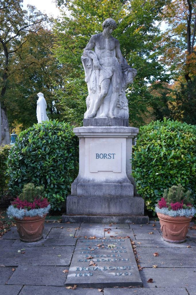 Grab des Architekten und Bauunternehmers Bernhard Borst (1883-1963) auf dem Westfriedhof in München